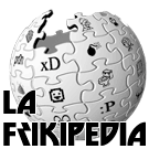 La Frikipedia's logo.